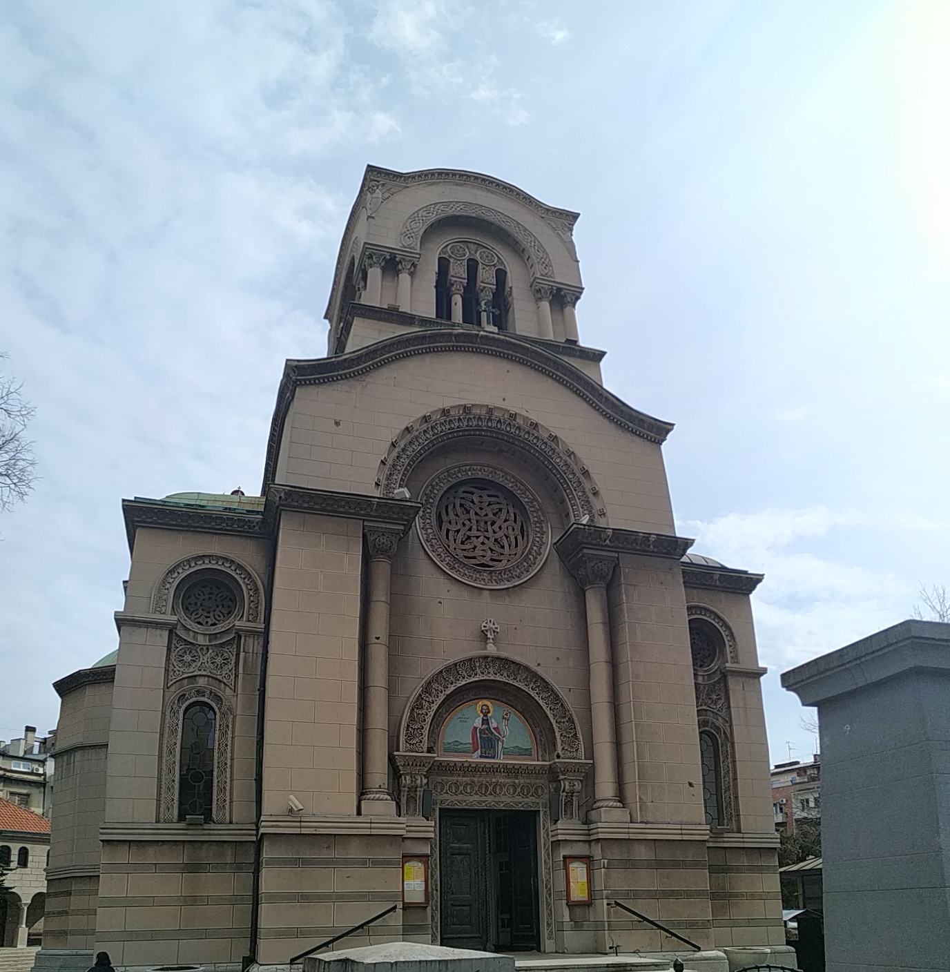 Ово је црква св. Александра Невског у Београду